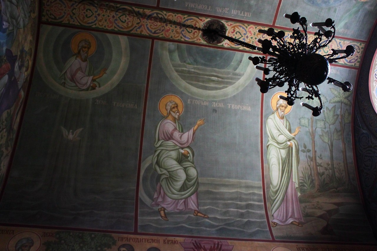 Фреска с описанием первых трех дней творения, согласно первым главам книги Бытия. Фреска выполнена в XIX веке на потолке храма святой Софии в Новгороде